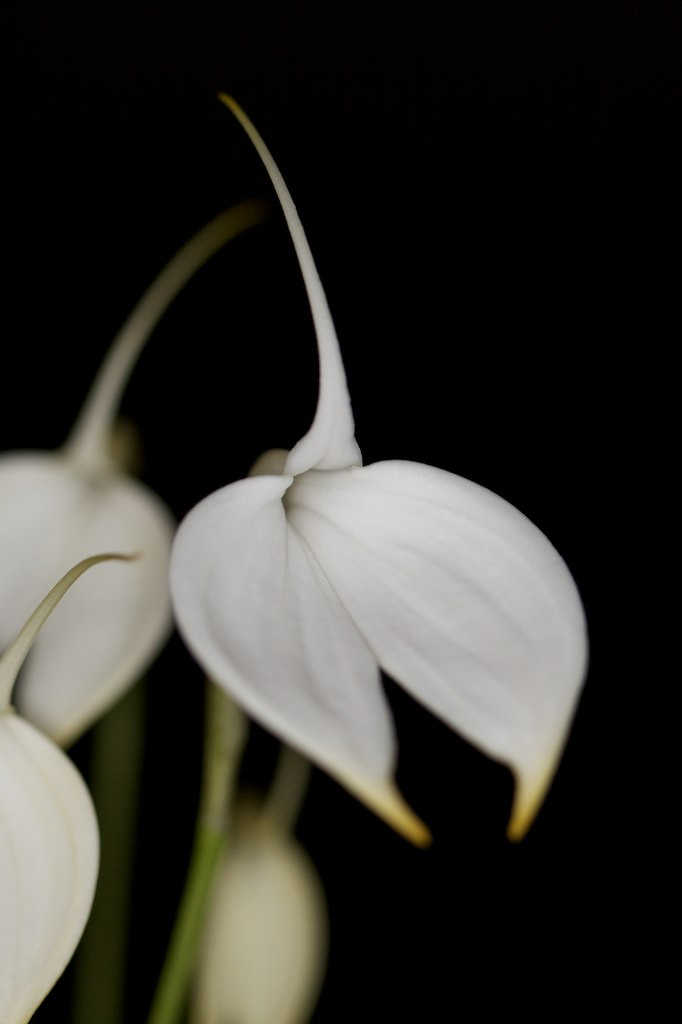 Masdevallia coccinea f. alba 'Snowbird' AM/AOS